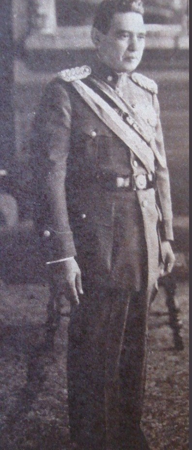 El General Marinez con la Banda presidencial